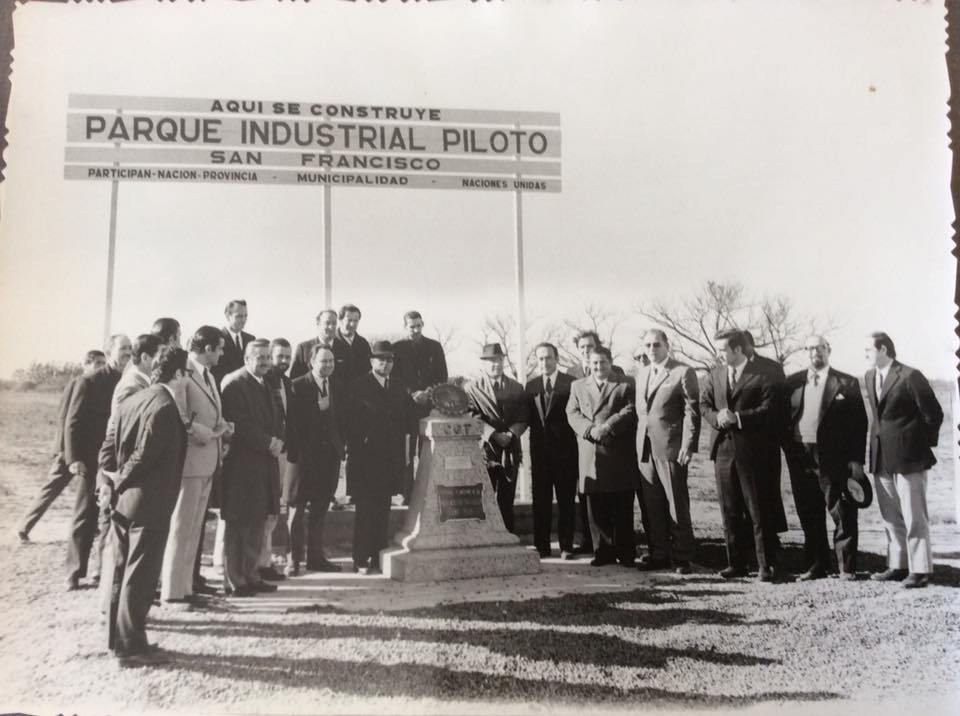 En la foto se puede ver el monolito donde se emplazaría tiempo más tarde el Parque Industrial San Francisco. Junto a este, las autoridades el día de la inauguración.